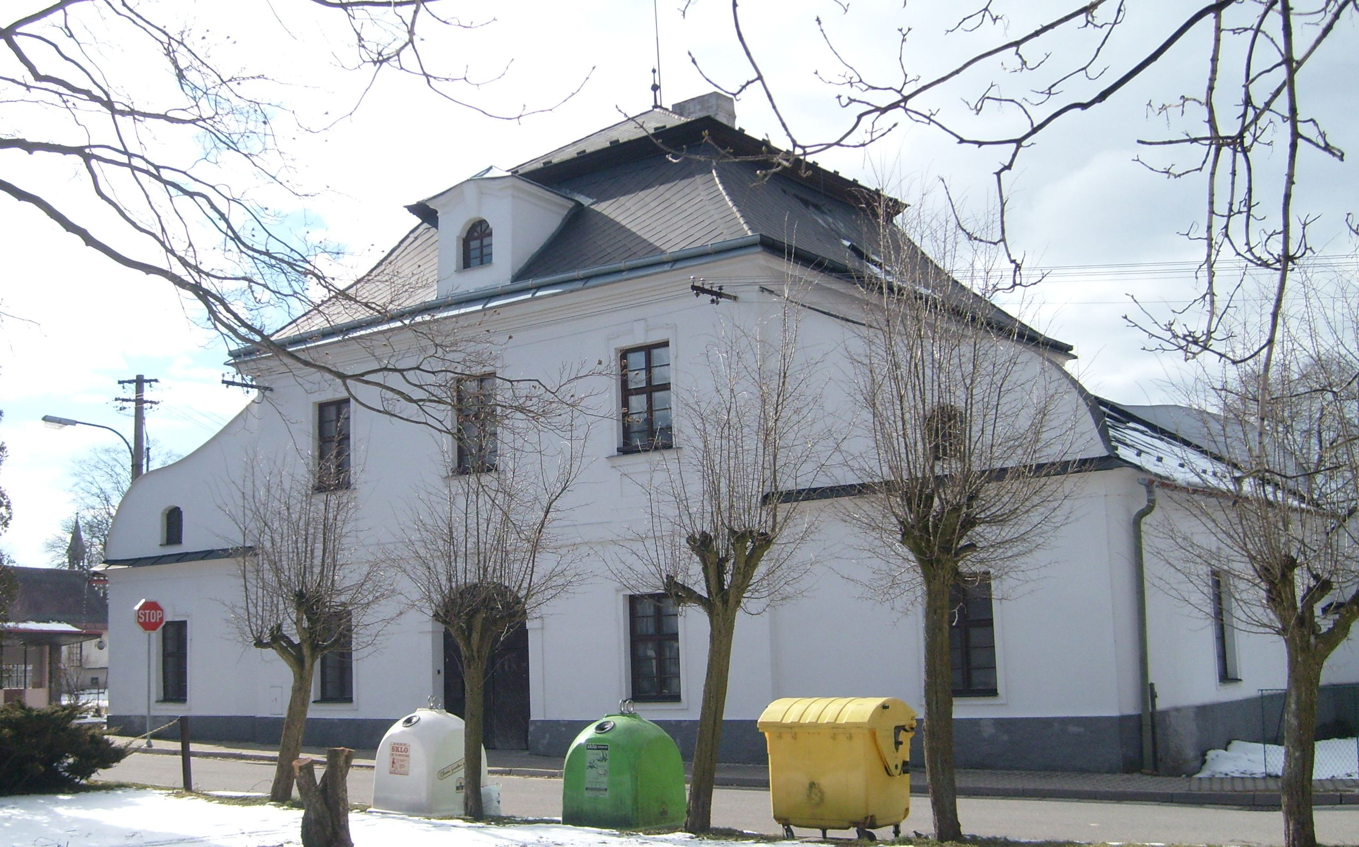 Hospoda (Vojnův Městec), náves 8, Vojnův Městec